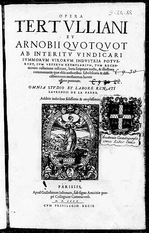 Page de titre, auteur René-Laurent de la Barre, traduction de L'Apologétique de Tertullien, année 1580